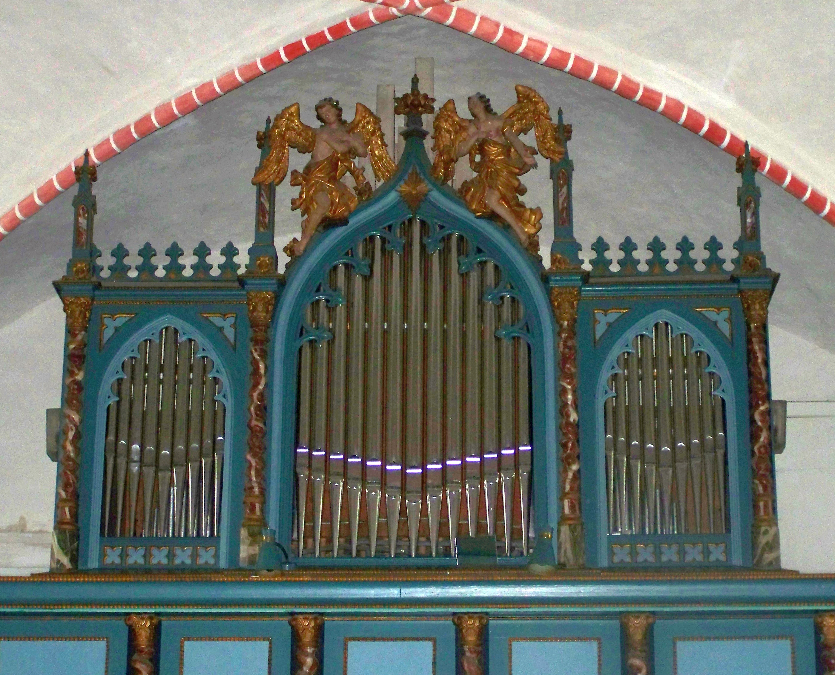 St.-Laurentius-Kirche in Zudar, Orgel